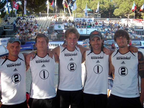 European Footvolley League (Nizza 2005) - Team germany